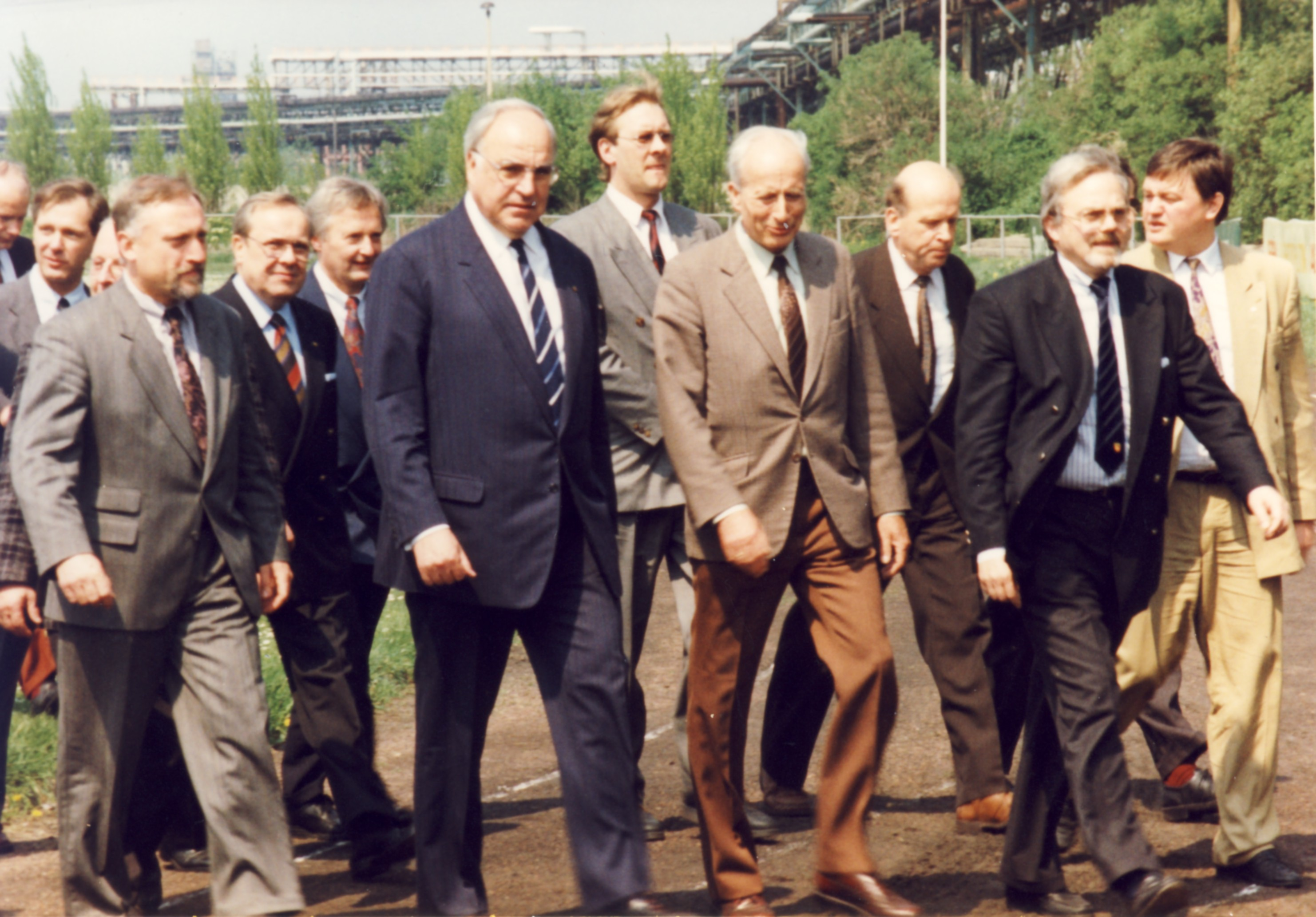 Bundeskanzler Helmut Kohl besucht am 10.05.1991 die Chemieregion Bitterfeld-Wolfen